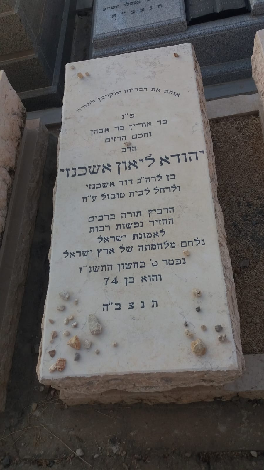 מצבתו של הרב אשכנזי בהר המנוחות בירושלים